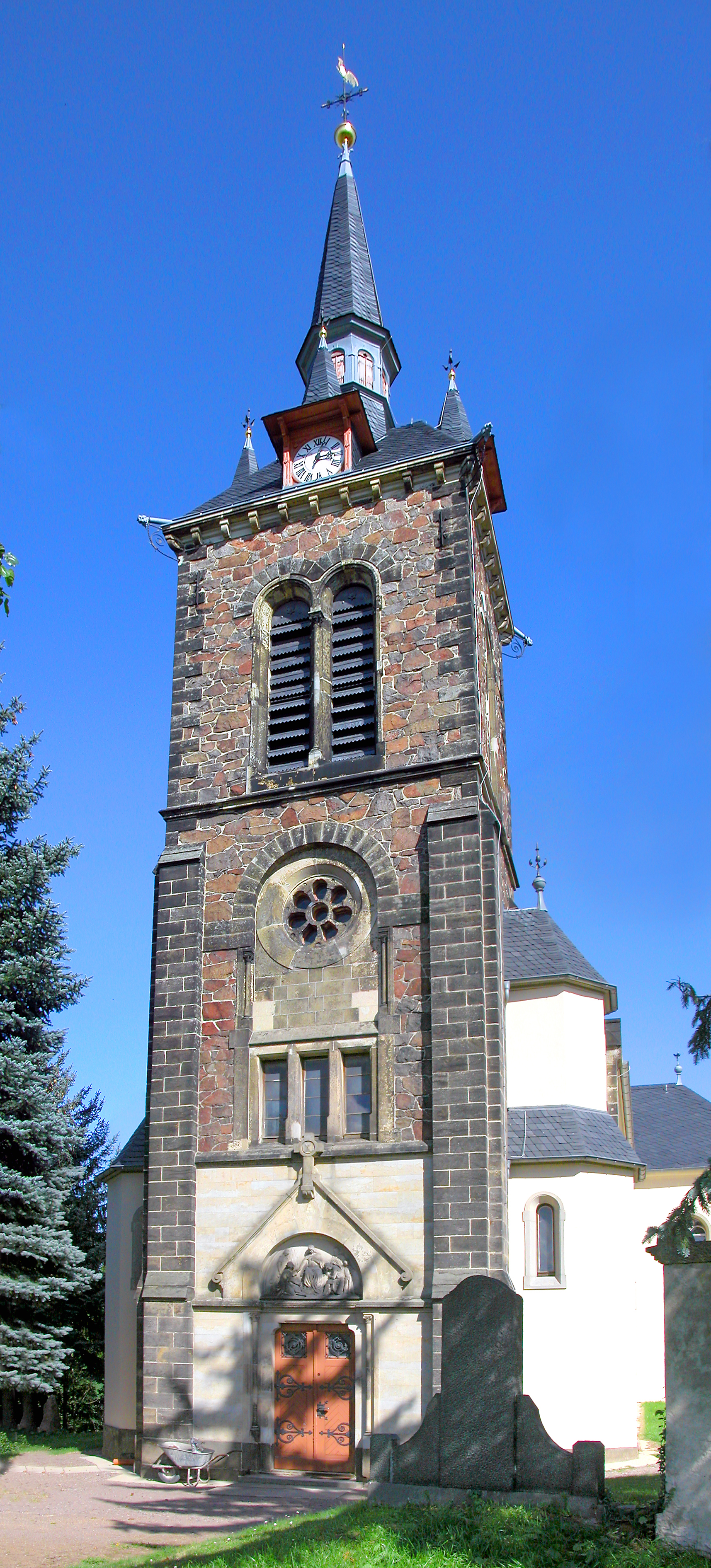 06.09.2007 01665 Constappel (Klipphausen): Ev.-Luth. Dorfkirche St. Nikolai (GMP: 51.104810,13.565966). Im Kern spätromanisch, später stark verändert. 1884 erweitert. Sicht von Westen. [DSCN29386-29387.TIF]20070906400MDR.JPG(c)Blobelt